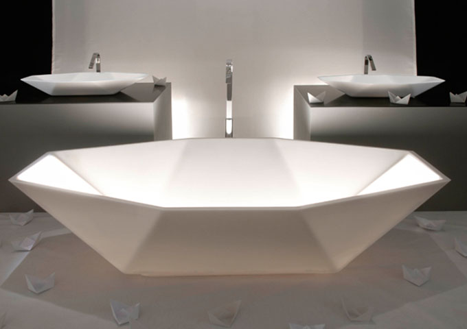 HAKOBUNESINK